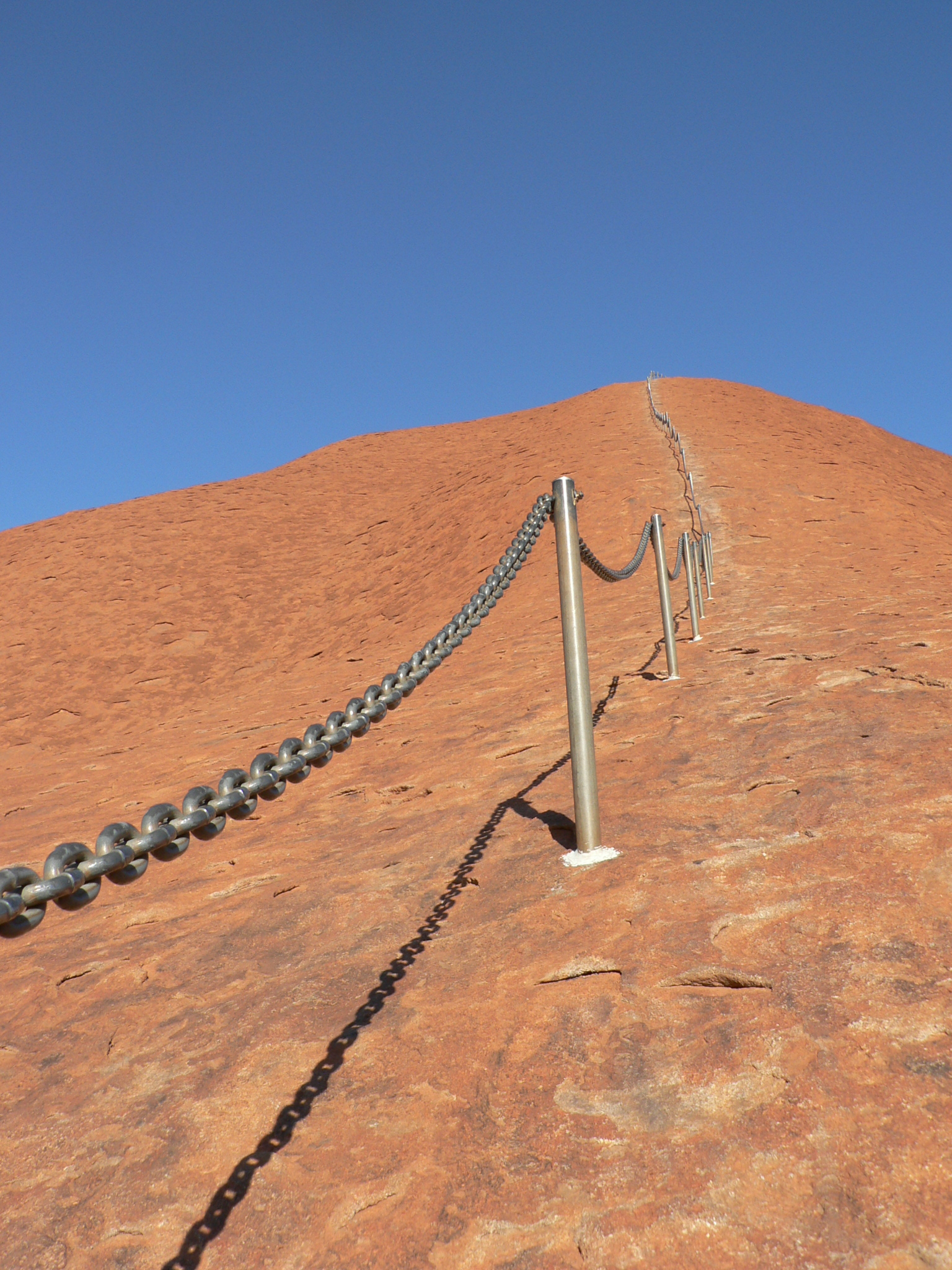 Uluru